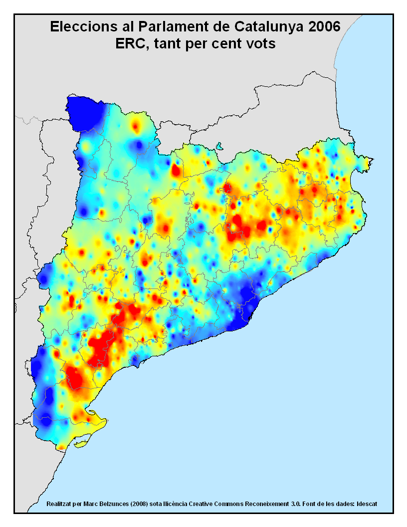 Distribució del suport a ERC a les eleccions catalanes del 2006. En vermell, màxim suport, en blau, mínim suport.